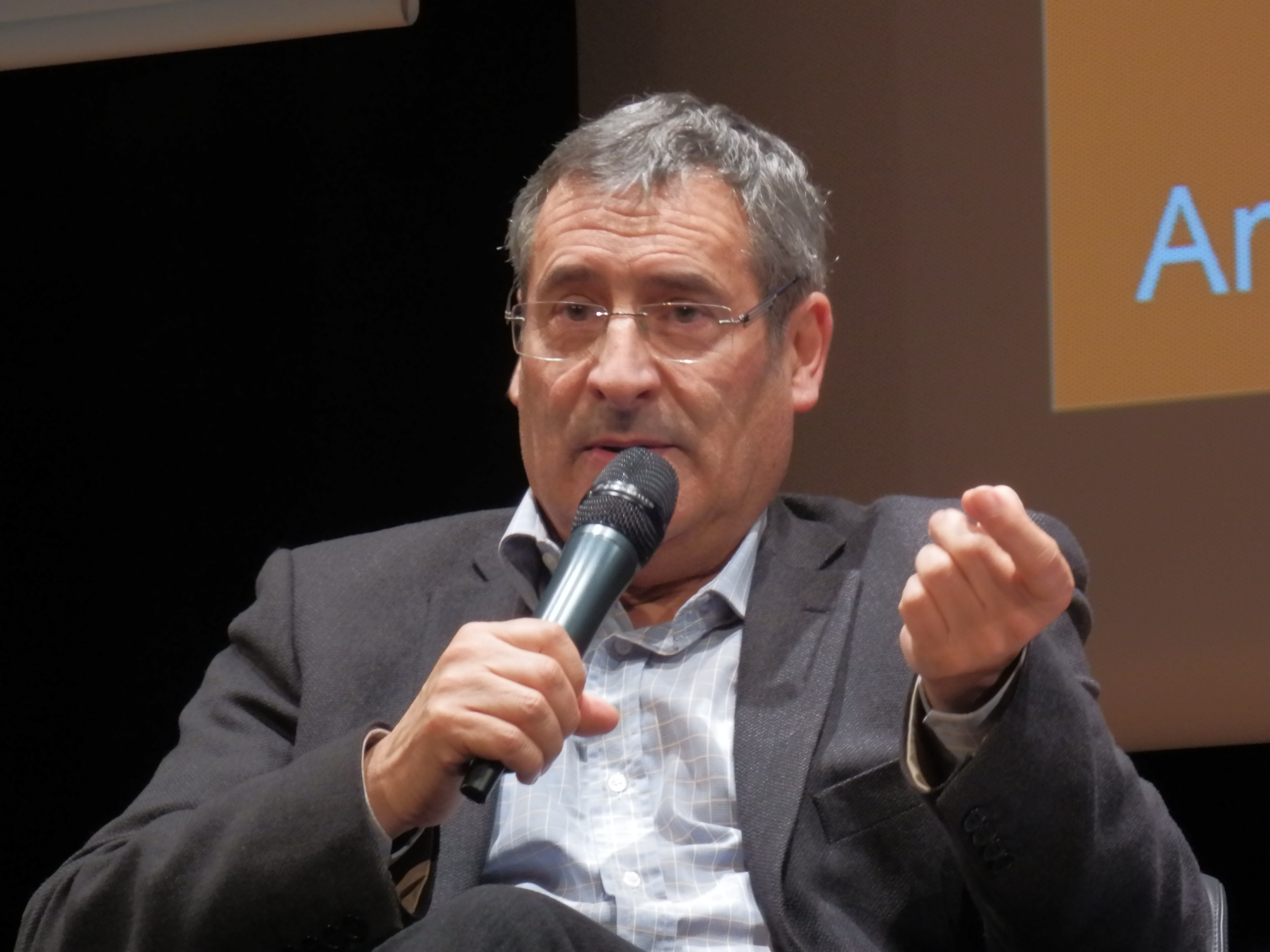 Gilles Bœuf à l'Espace-des-sciences, le 6 novembre 2012